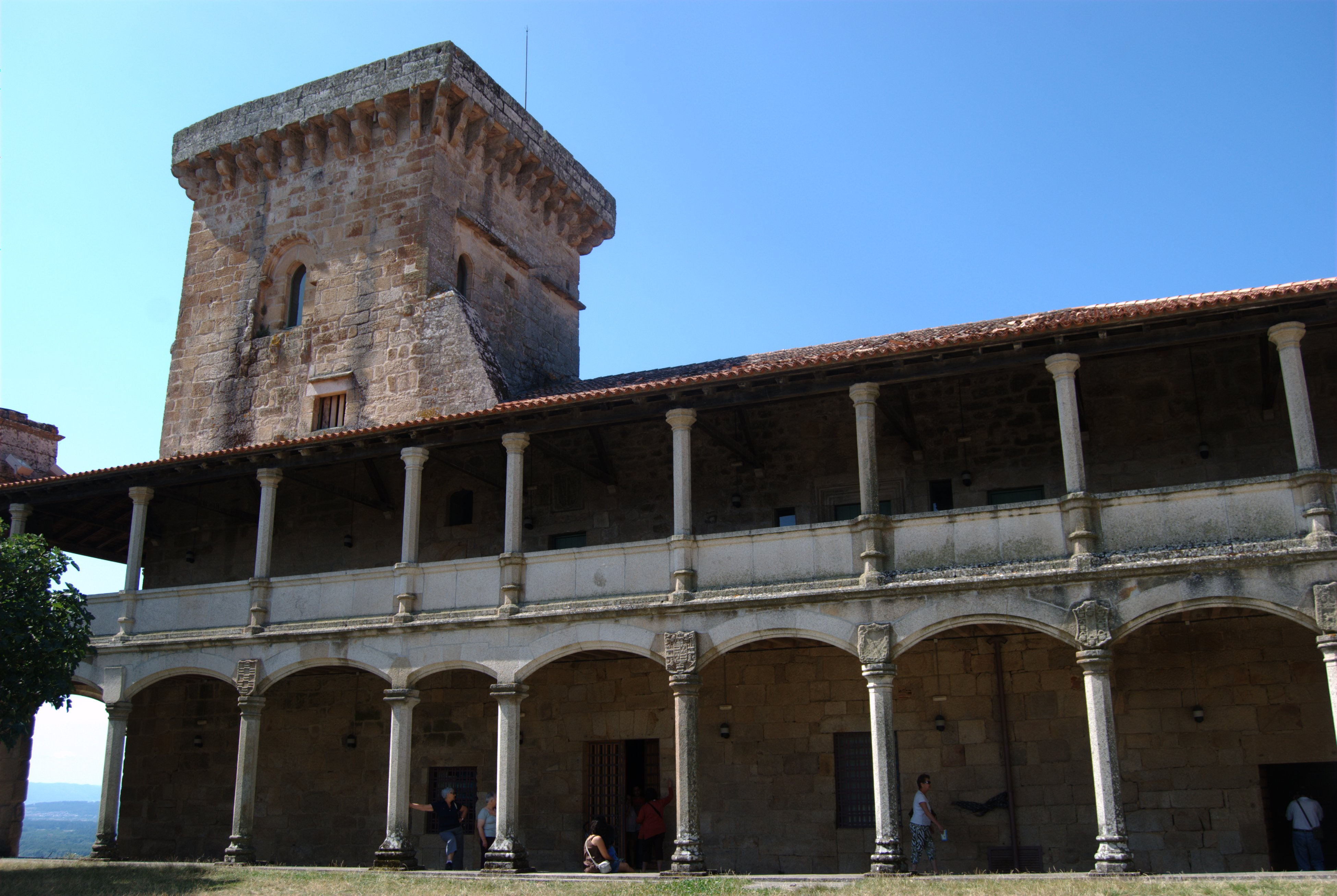 Pazo das damas, Monterrei